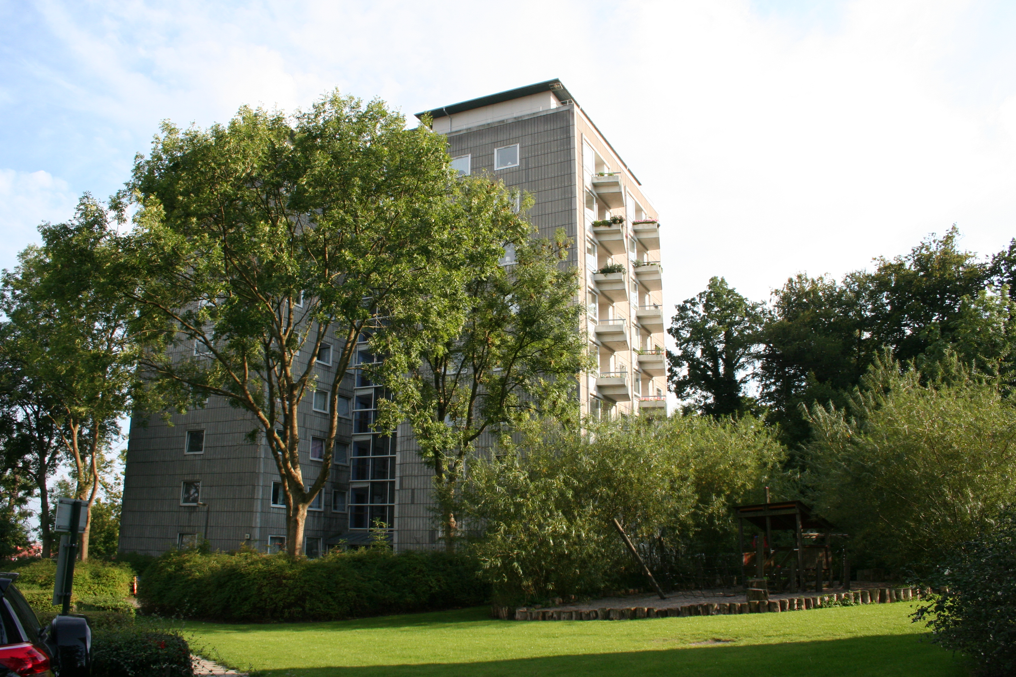 Højhusbebyggelsen Ved Bellahøj, København, Danmark